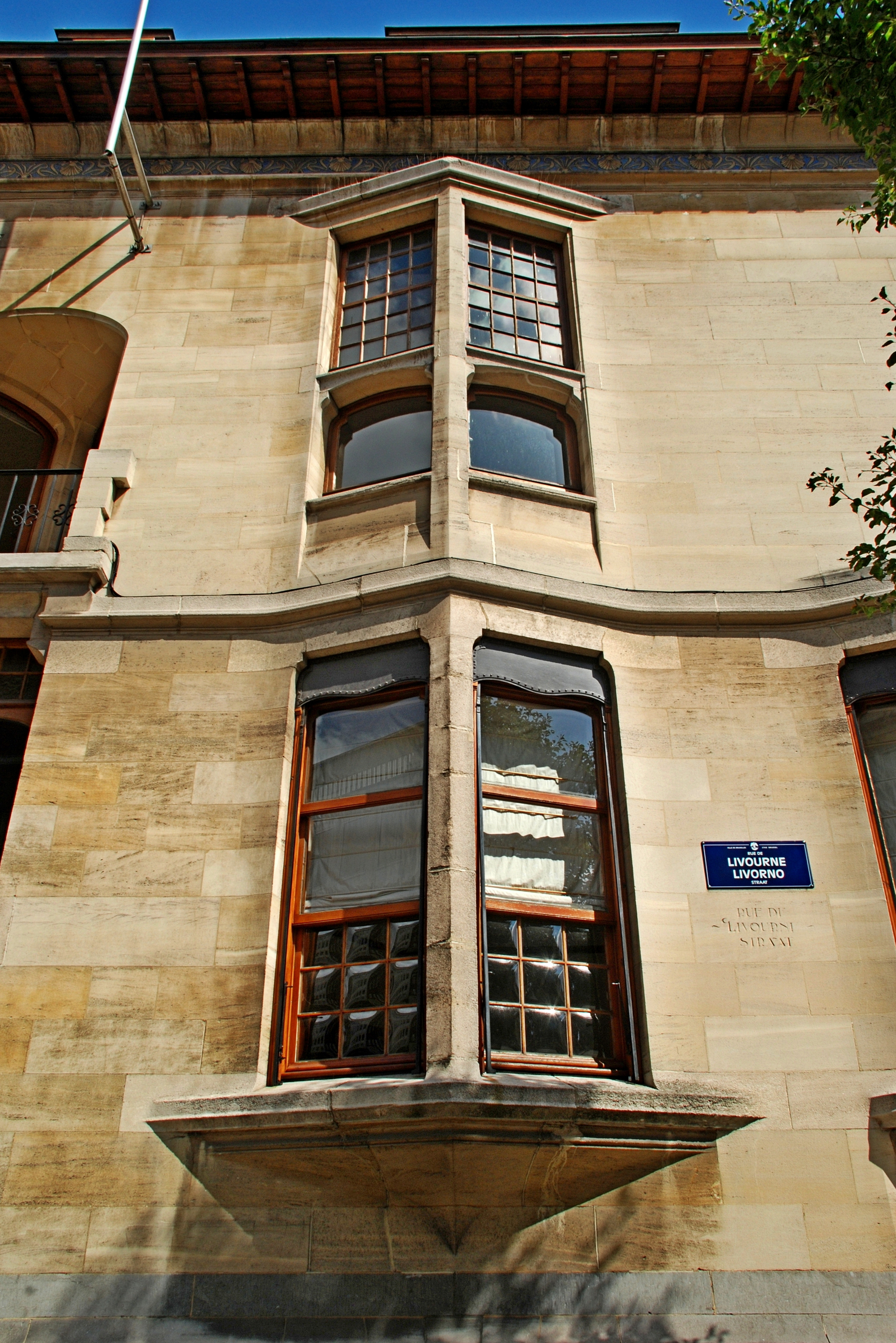 Belgique - Bruxelles - Hôtel Otlet